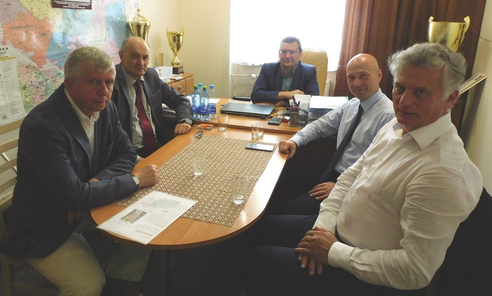 Stargard Brifing, 21.06.2019